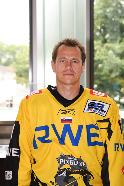 Dušan Milo, Krefeld Pinguine 2008/2009